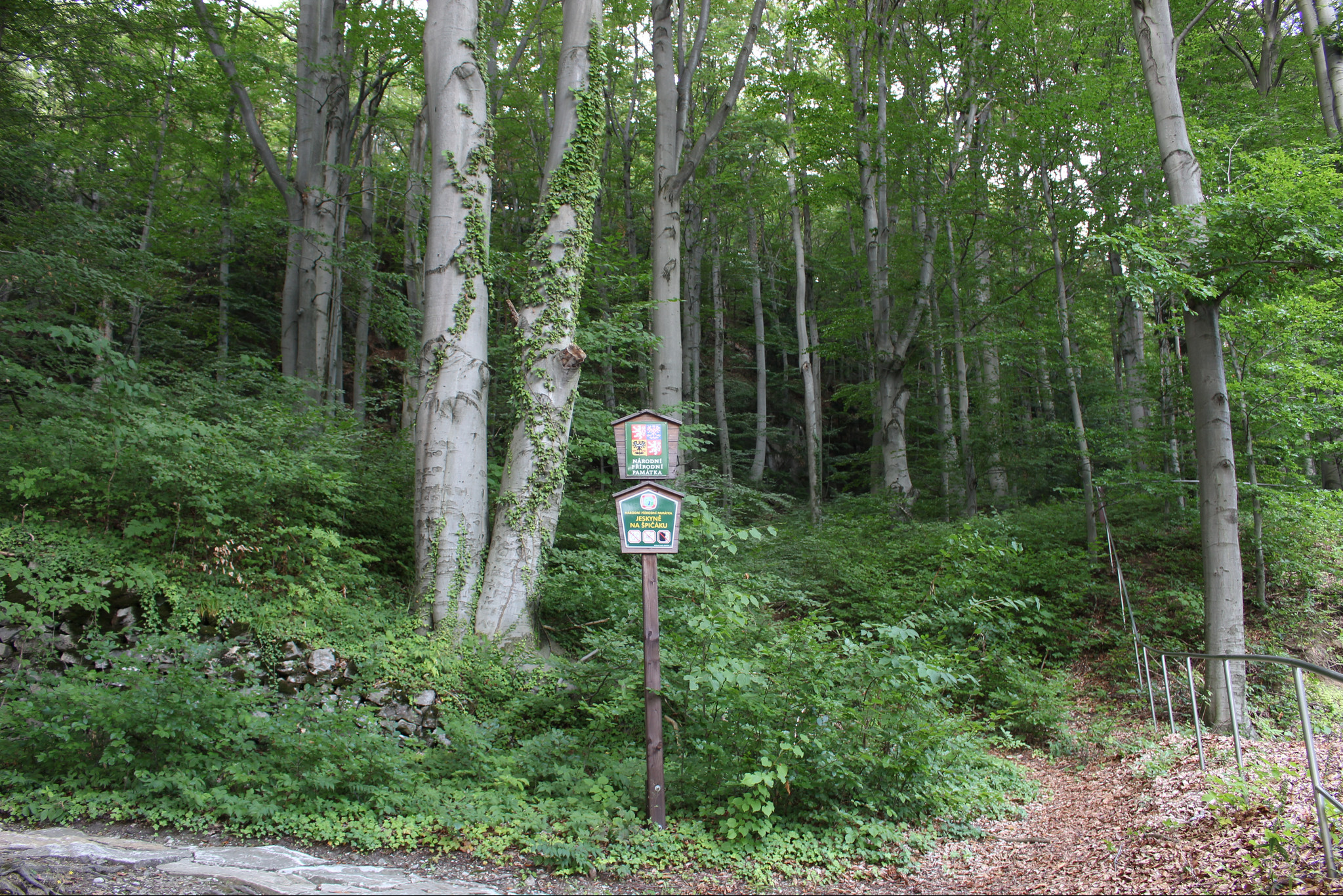 Národní přírodní památka Na Špičáku, příchod ke vstupu do jeskyně Na Špičáku, okres Jeseník, Olomoucký kraj